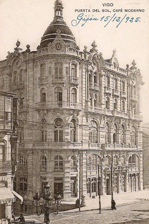 Edificio El Moderno (1897) do arquitecto Michel Pacewicz, rúa Policarpo Sanz nº 1, Vigo, nunha postal de Hauser y Menet.